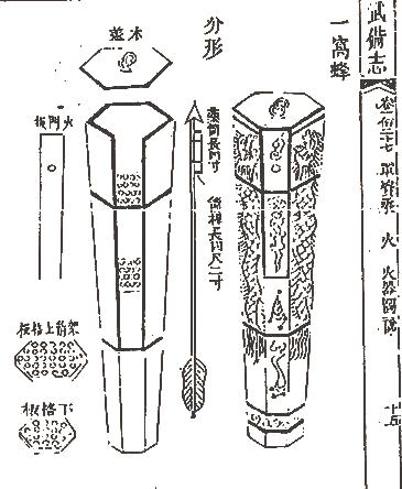 《武备志·铅弹一窝蜂》的一窩蜂